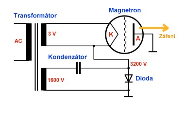 Schema zapojeni MAGNETRONU.